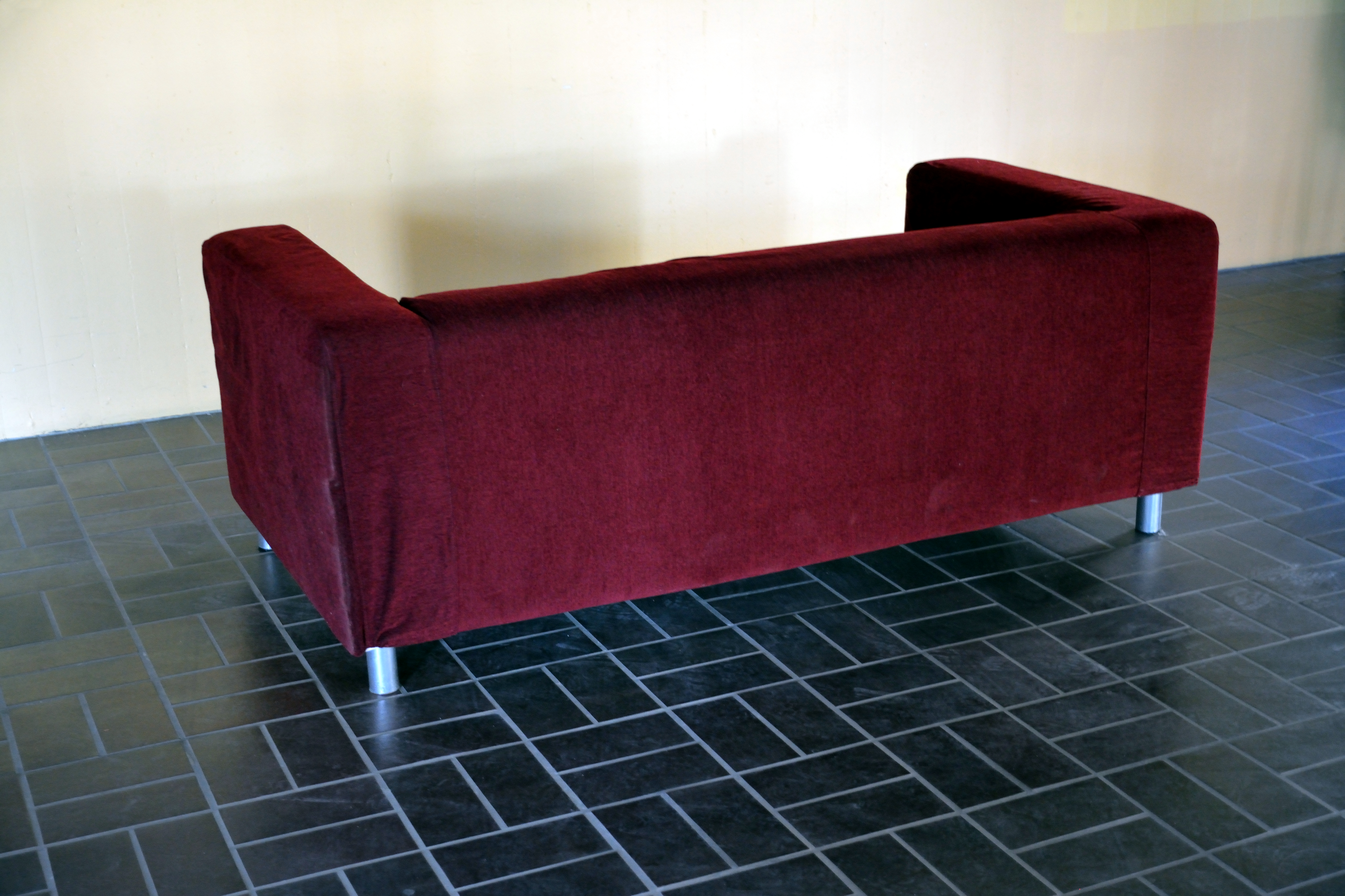 Impressionen aus dem Museum Europäischer Kulturen in Berlin.Hier: Ruhezonen im Museum